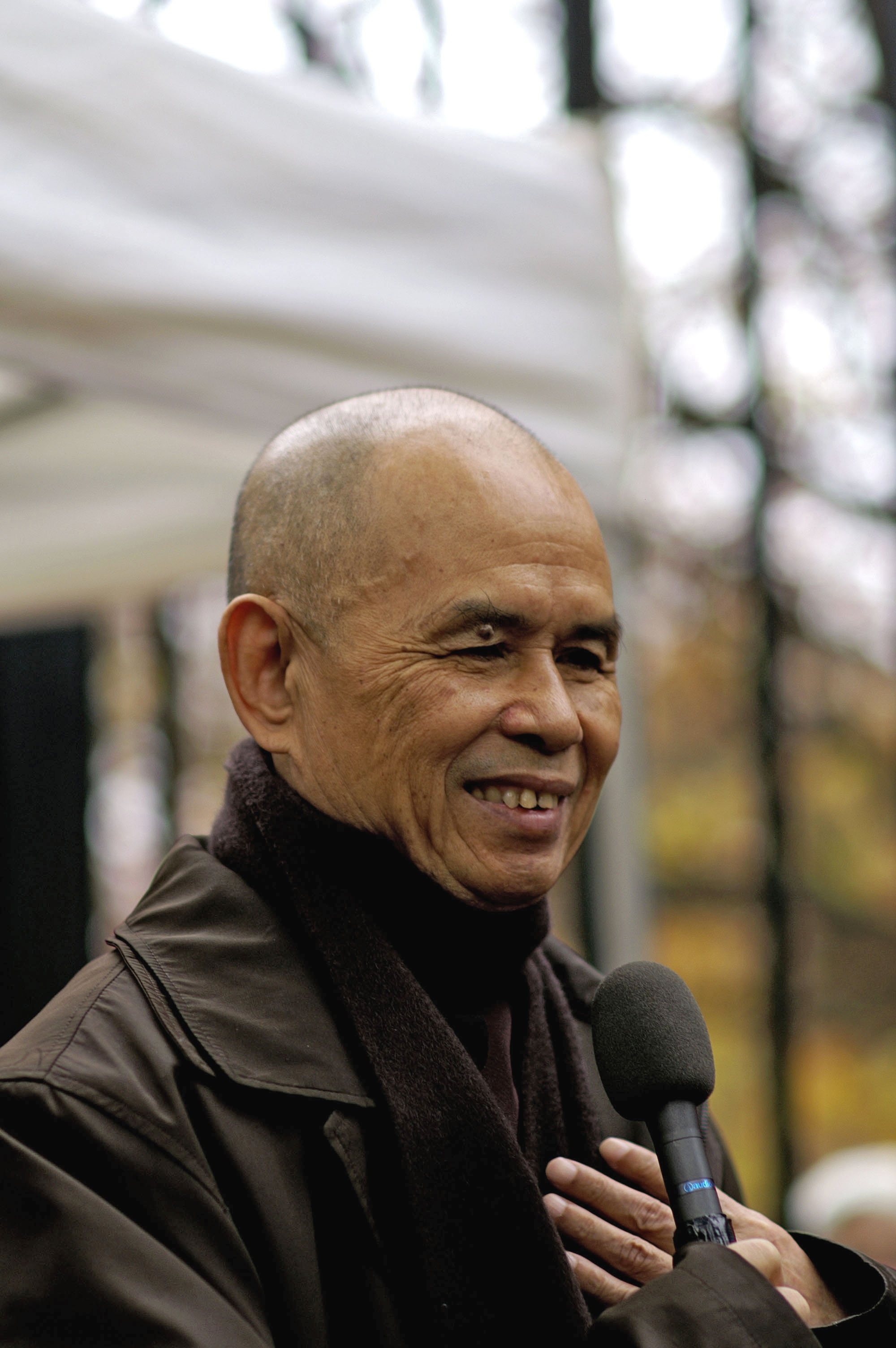 Thich Nhat Hanh